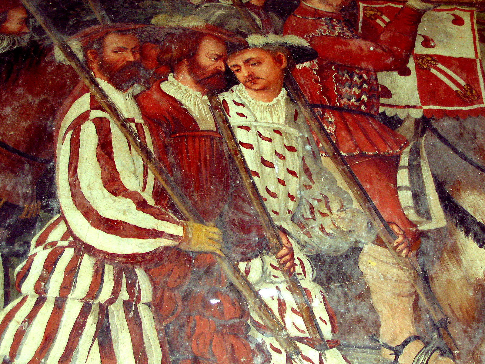 Affreschi del Castello di Malpaga, di Bartolomeo Colleoni. Cristiano I di Danimarca visita il Colleoni. Particolare: Armigeri. Opera attribuita al Romanino (1467). Foto di Giorces.